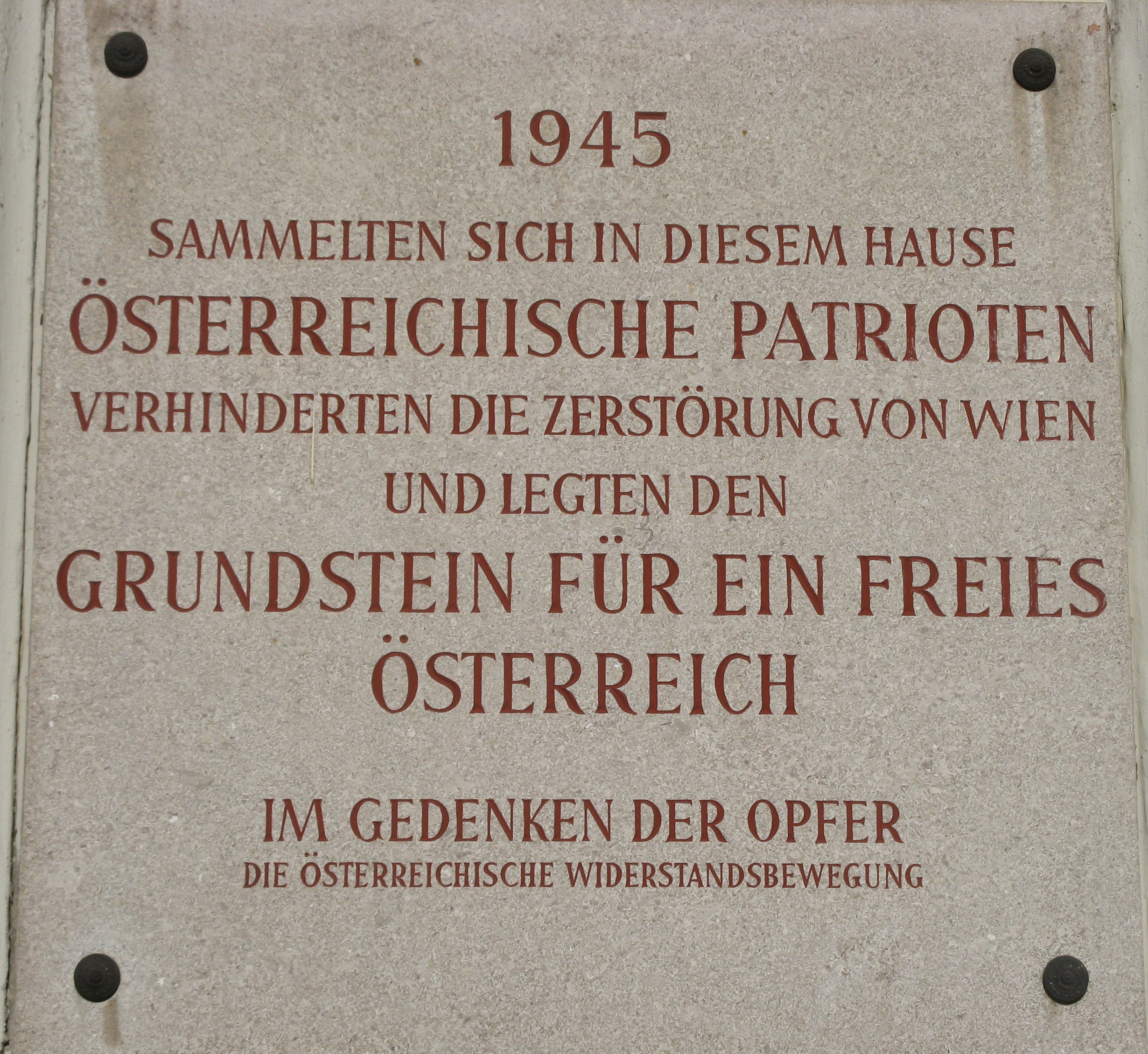 Gedenktafel O5, Palais Auersperg, Auerspergstraße 1, Wien-Josefstadt